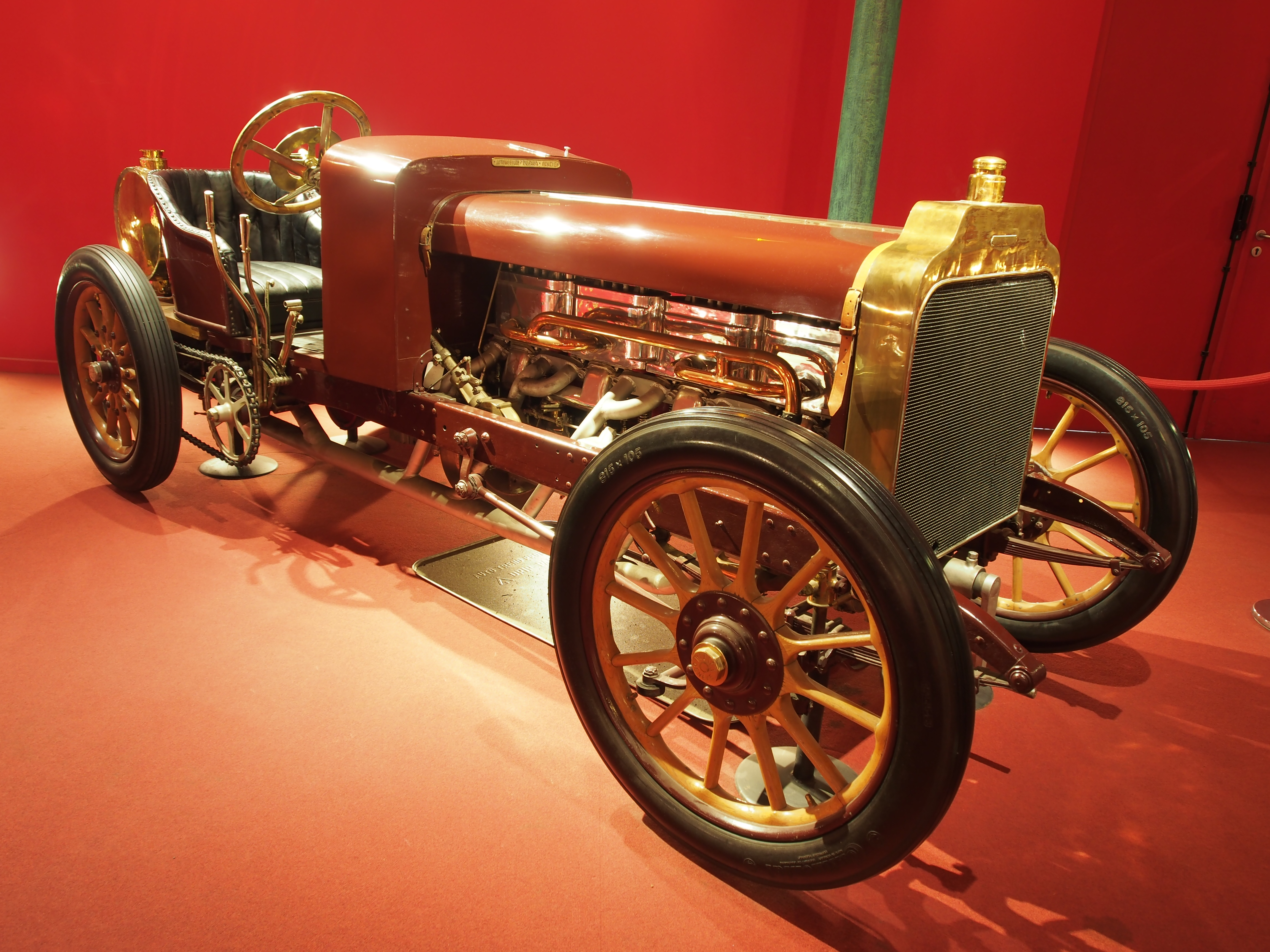 Photographed at the Cité de l’Automobile, Musée national de l’automobile, Collection Schlumpf, Mulhouse, France.